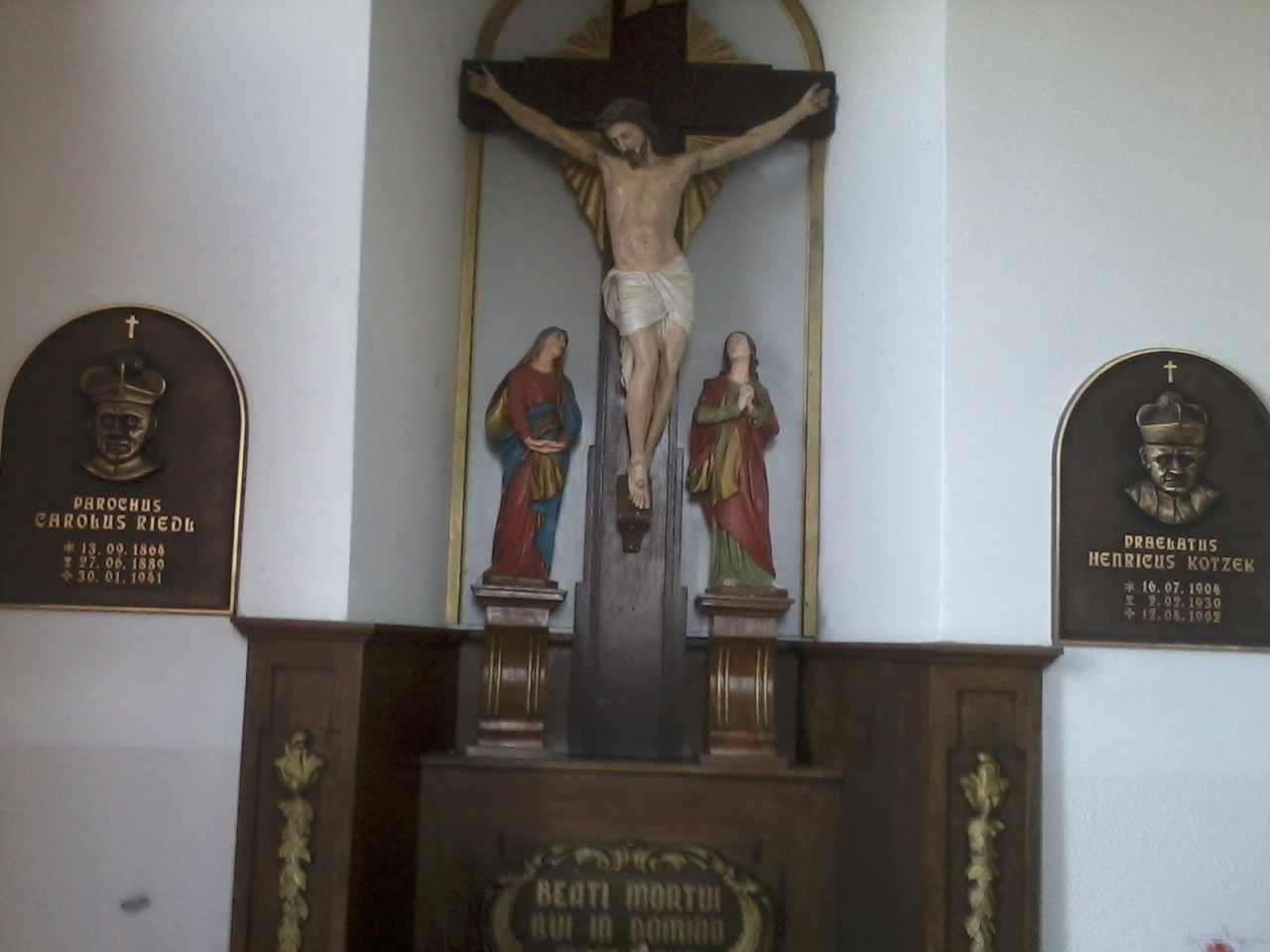 Przedsionek 02